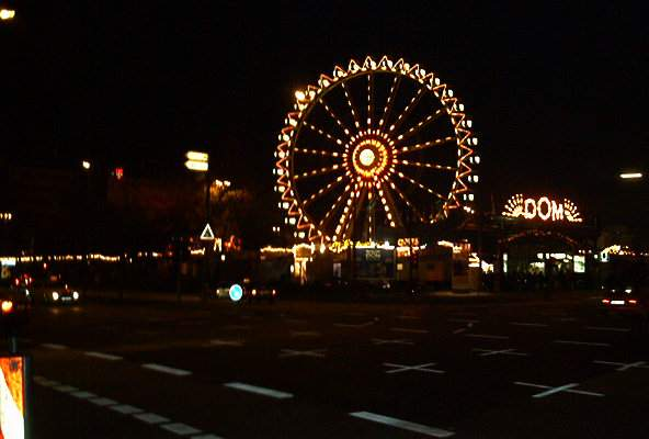 Beschreibung: Hamburger Dom Quelle: Fotografiert von Benutzerin Kellerkind (Anneke Wolf) am 26.11.2003 Lizenzstatus: GNU FDL